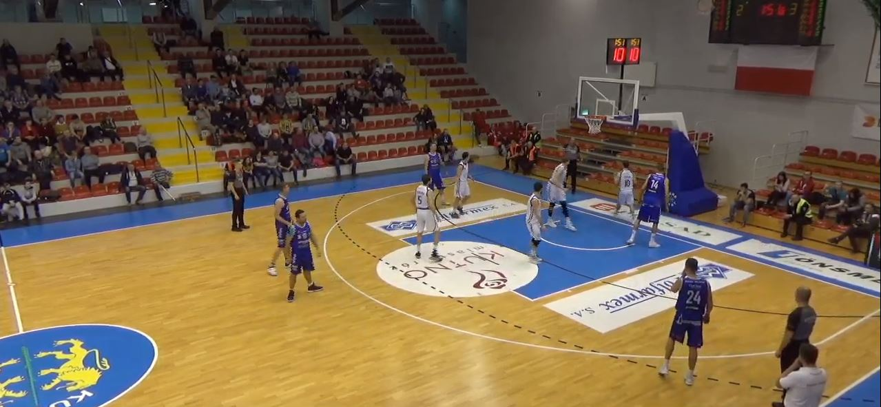 Mecz Polfarmexu Kutno z Pogonią Prudnik.